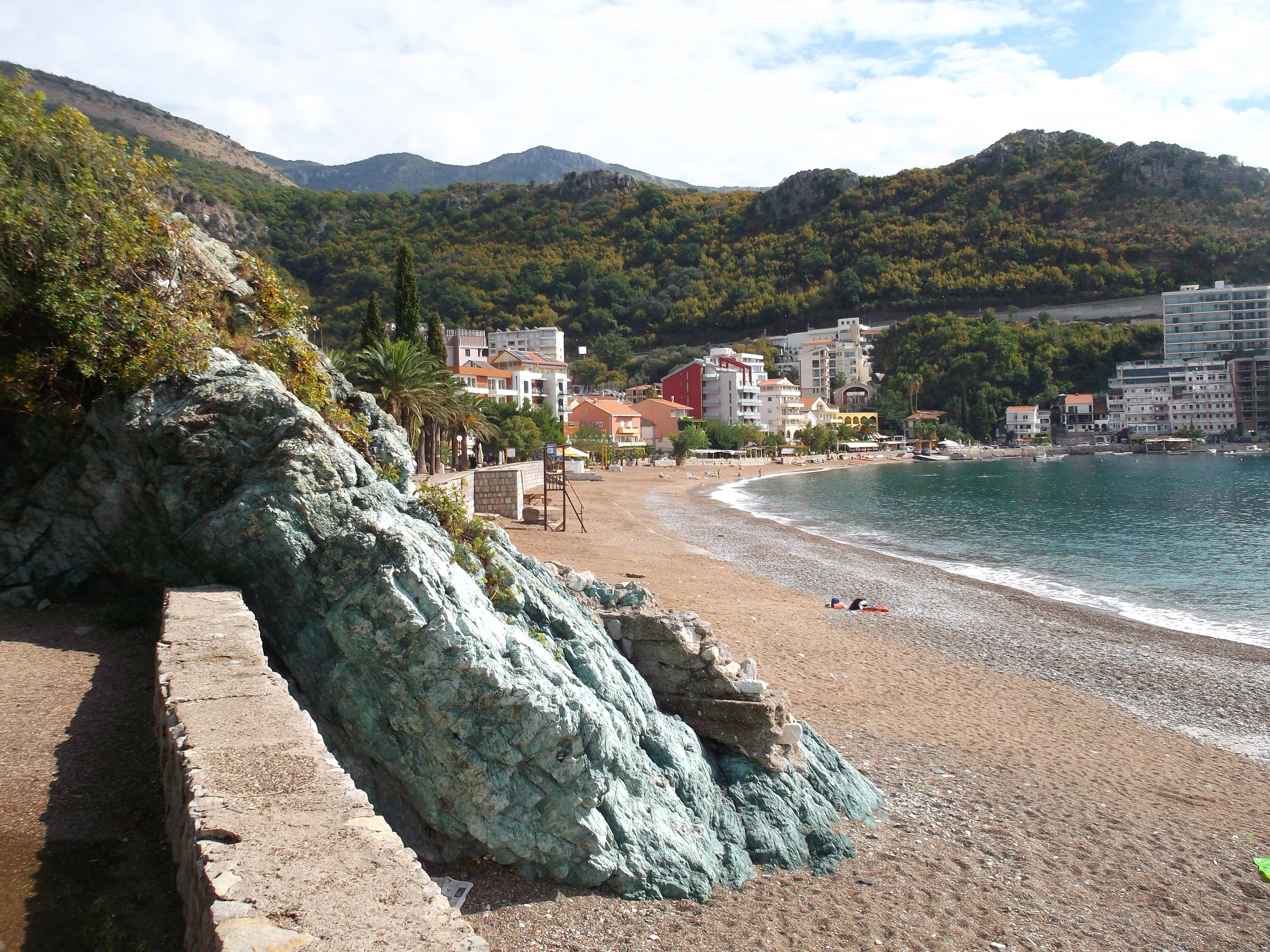 Bečići, Montenegro